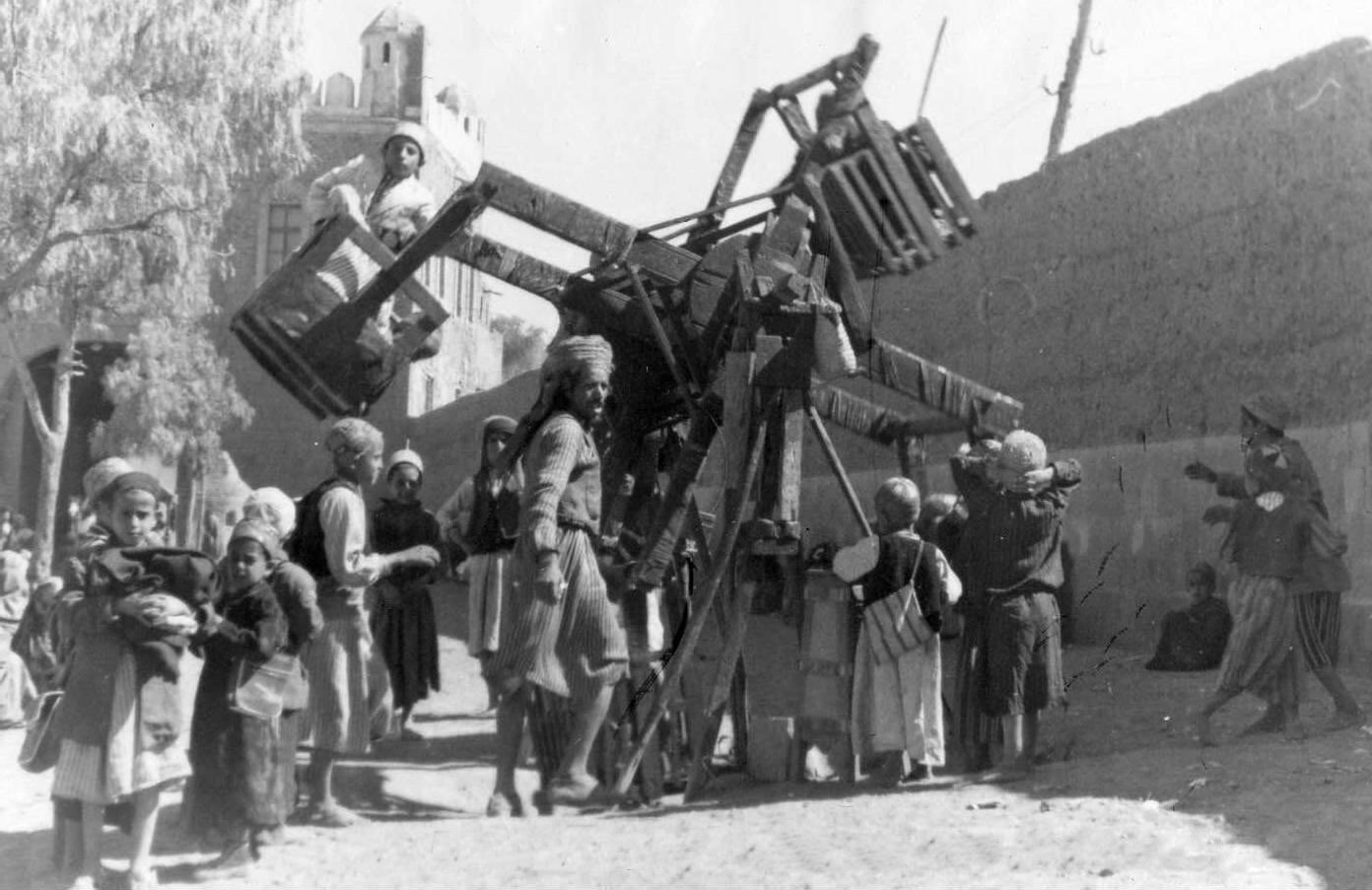 Karussel